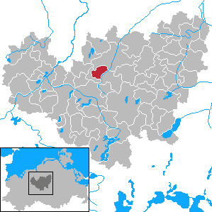 Kuhs in Mecklenburg-Vorpommern - District Güstrow